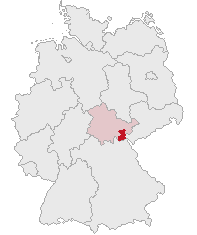 Saale-Orla-Kreis, Thuringia, Germany